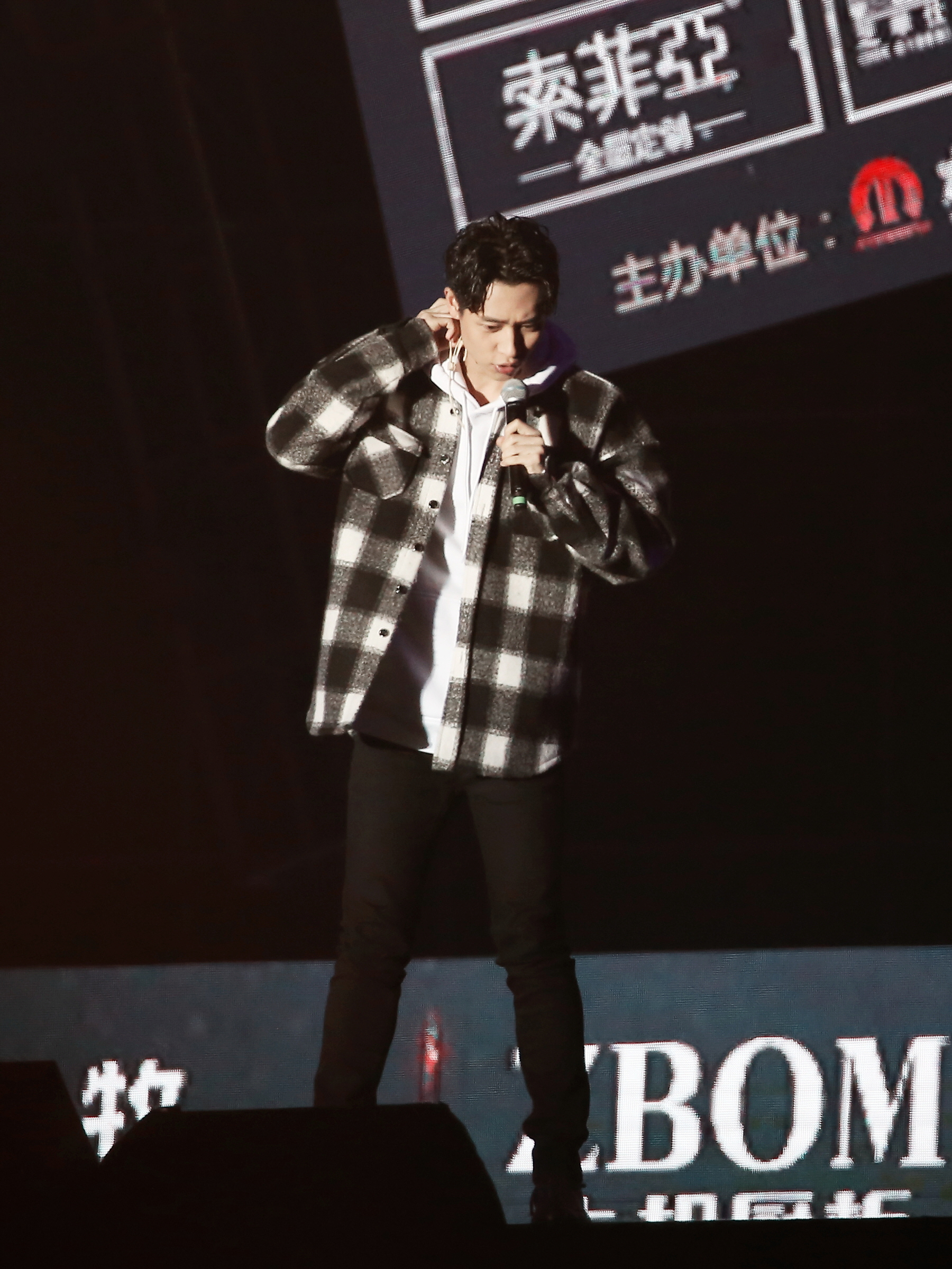 2017.3.25 红星美凯龙群星演唱会 魏晨